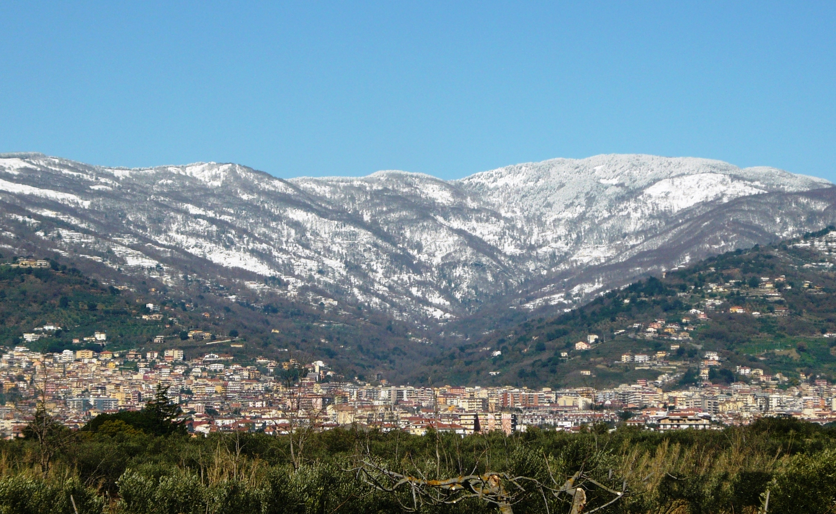 Reventino, catena montuosa